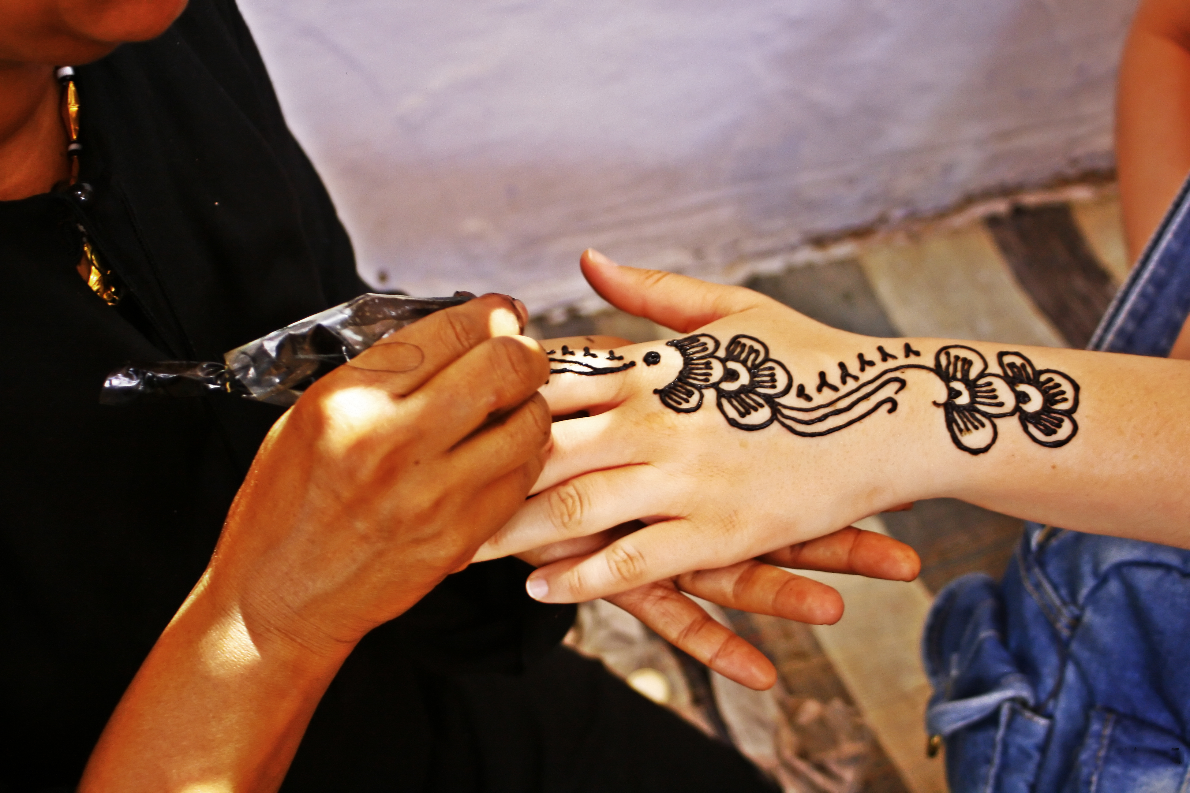 tatuaje en Hena